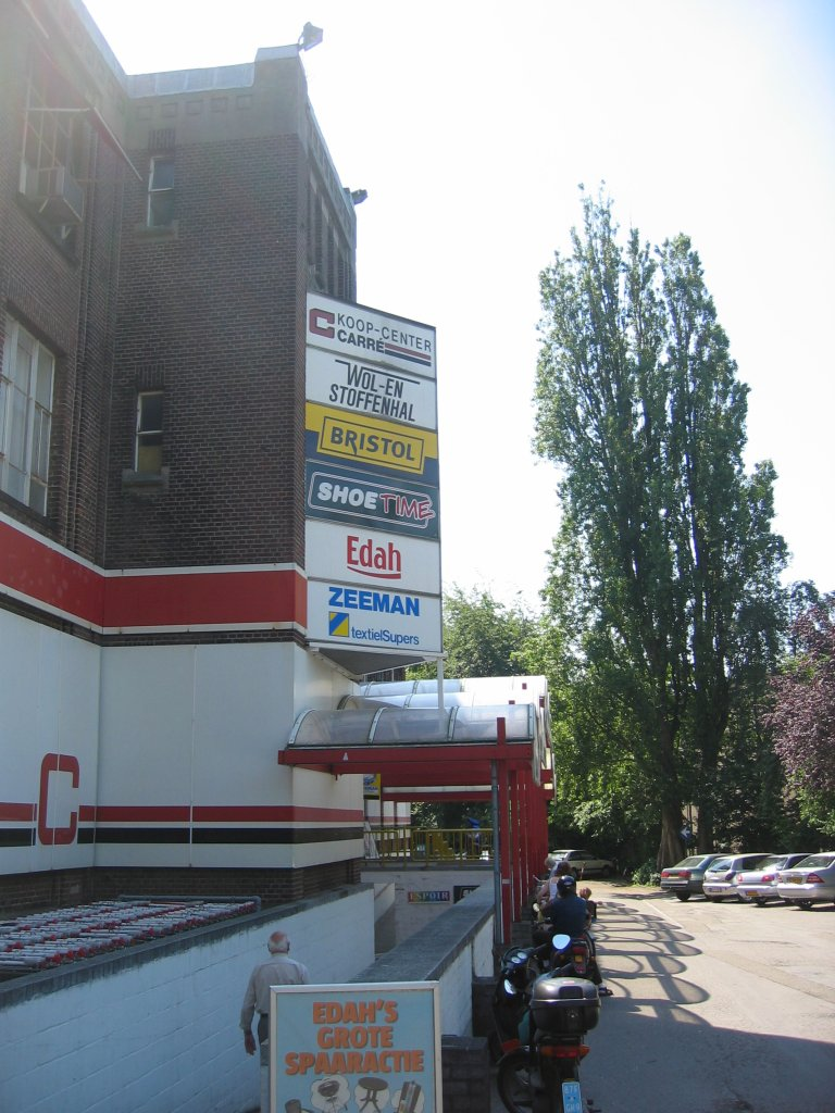 Koop-Center Carré te Maastricht is een winkelcentrum met onder andere een Zeeman. Een winkelcentrum.